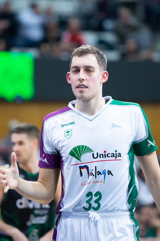 Kyle Wiltjer en un partido de la liga ACB en el Palau Olímpic de Badalona entre el Divina Seguros Joventut y el Unicaja.